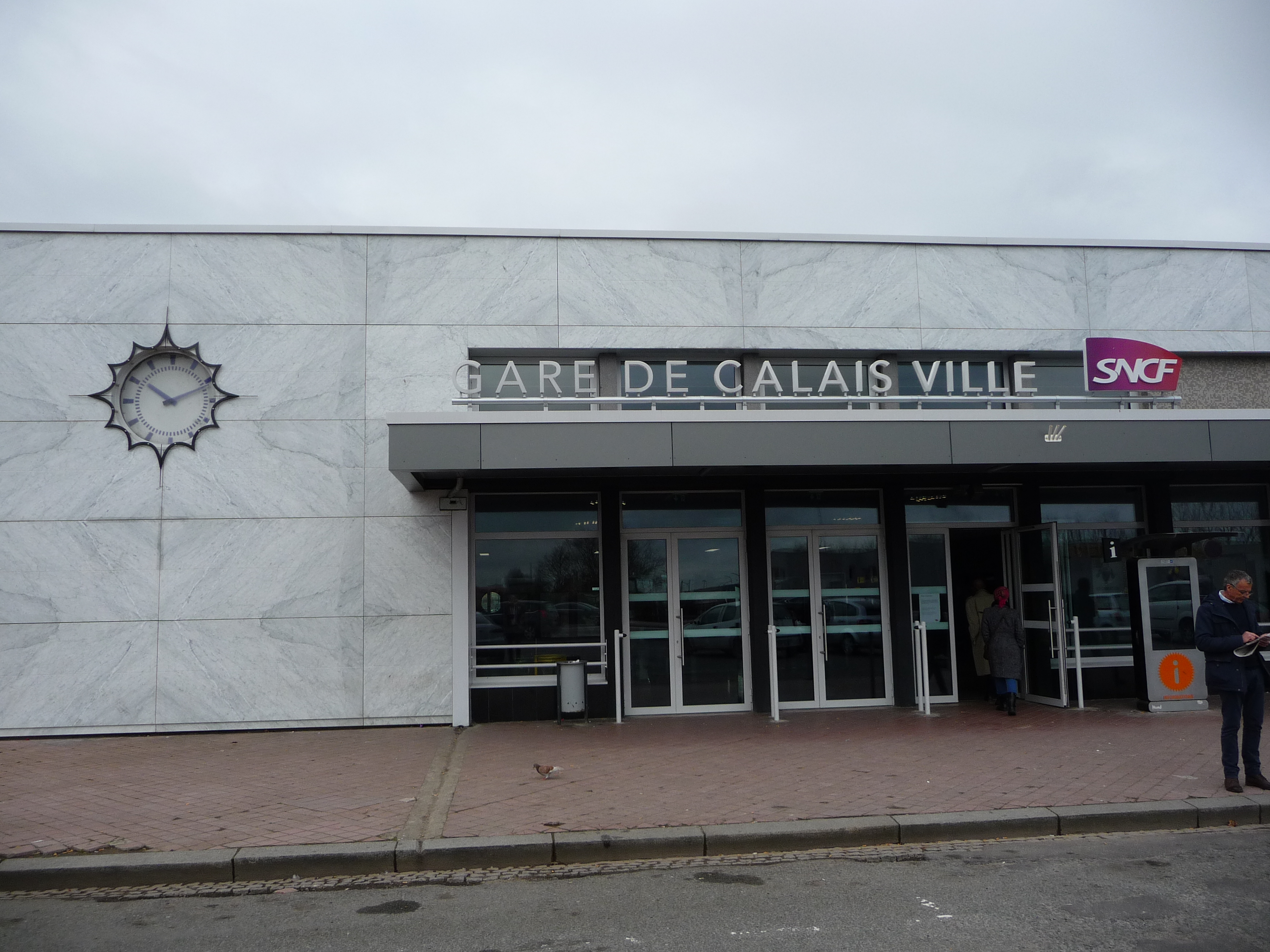 Gare de Calais-Ville